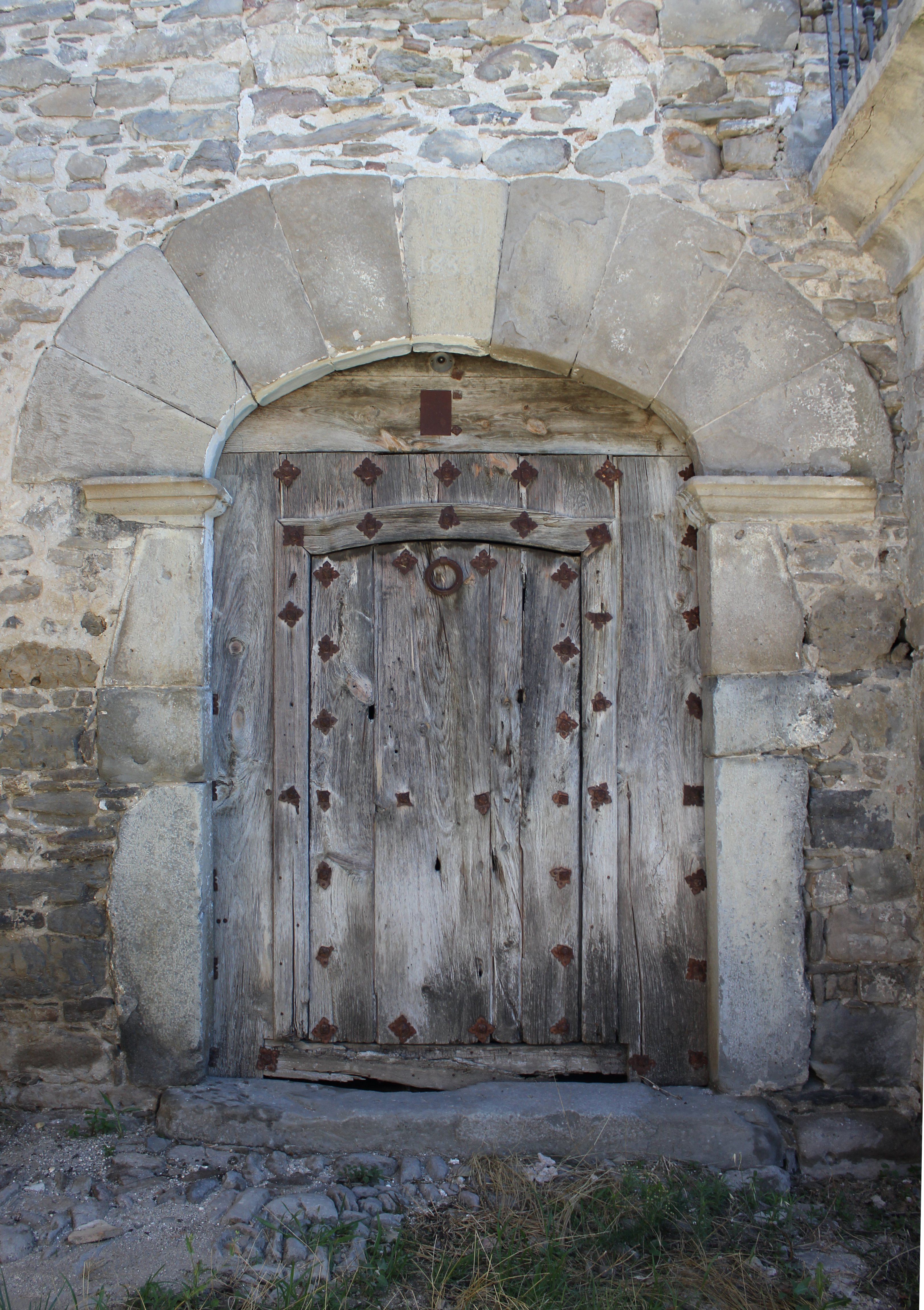 Aragonés: Puerta d'o patio de Casa Lascorz de a Pardina